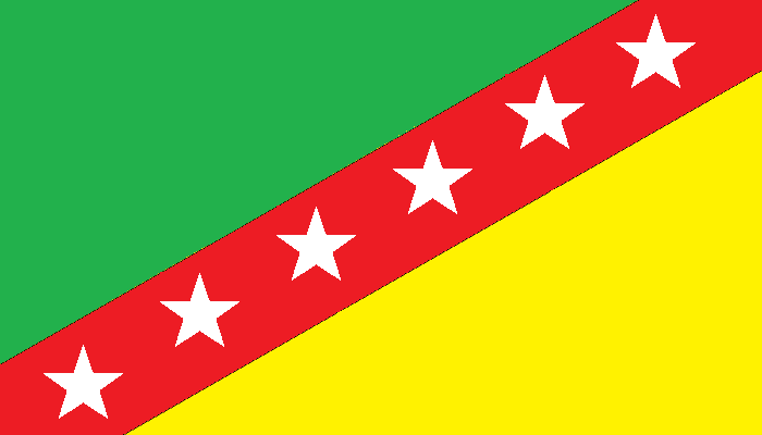 Bandera del Cantón Loreto